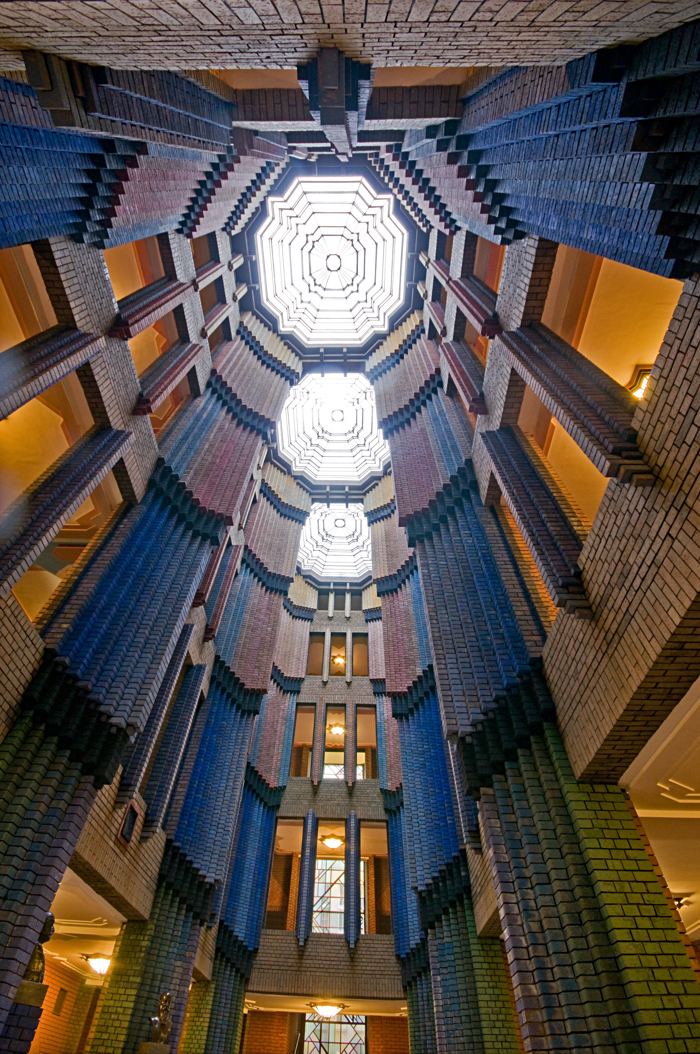 Industriepark HöchstBehrensbau: Eingangshalle